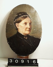 Portrætmaleri af Abelone Christine Charlotte Amalie Kjer som har hængt i sønnen Johannes Vogelius' dagligstue.